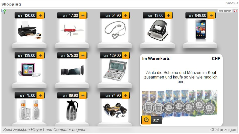 Mehrpersonenspiel Virtueller Einkaufskorb LearningApps